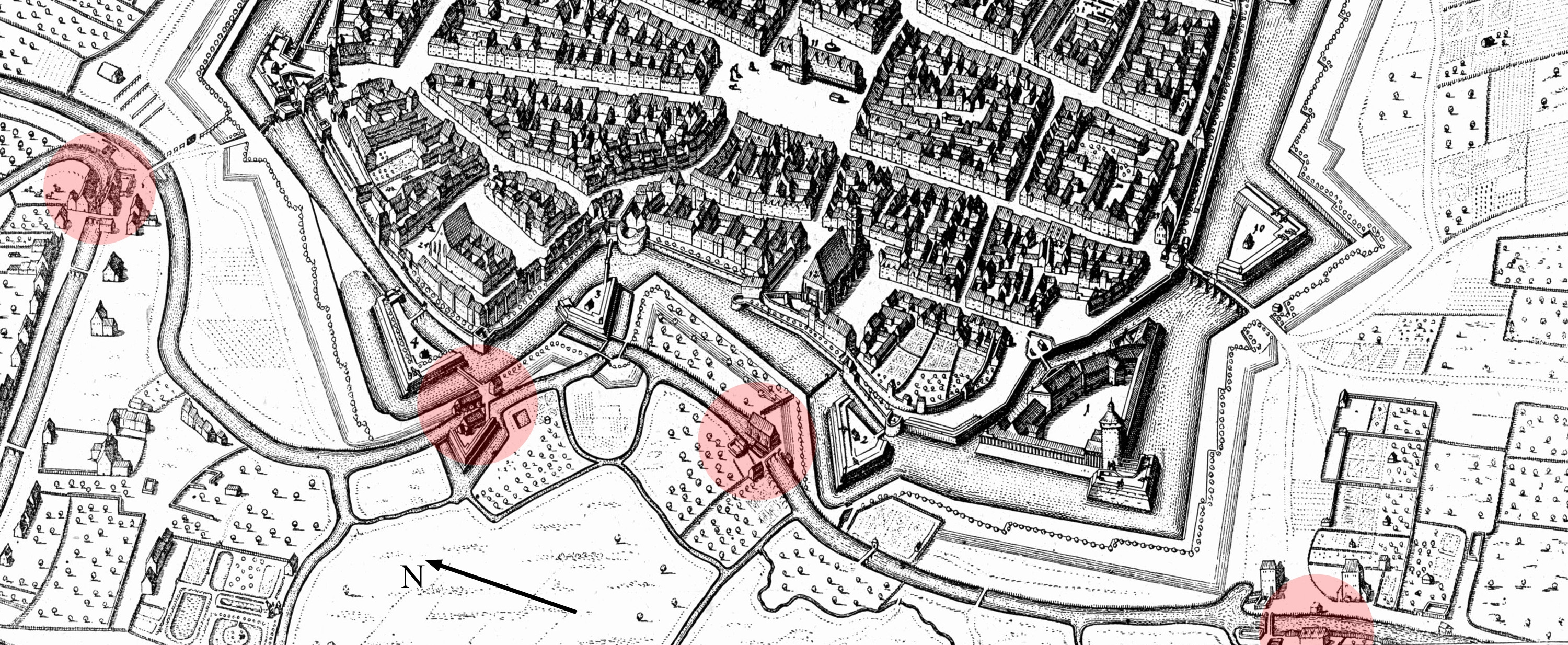 Die Leipziger Mühlen auf einem Stich von Merian um 1650